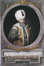 Portrait de Soliman vers la fin de son règne.